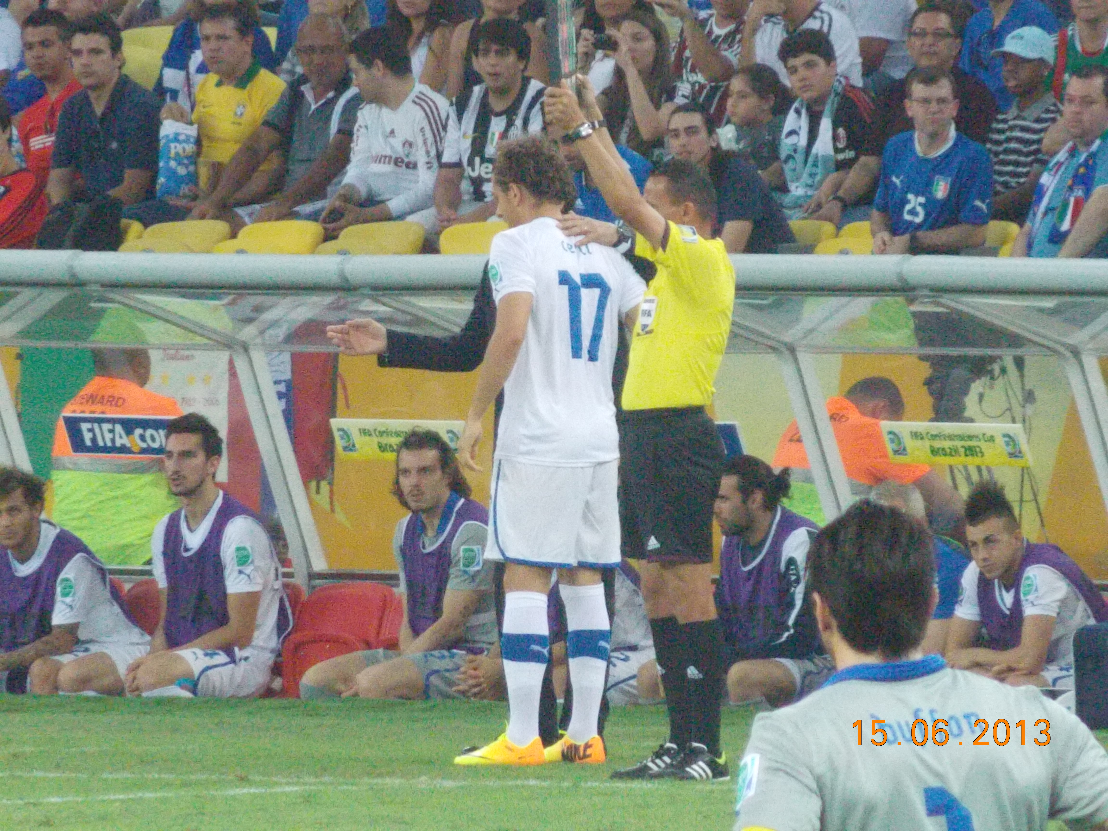 Confederations Cup 2013, Maracanã Stadium, Mexico 1 x 2 Italy.